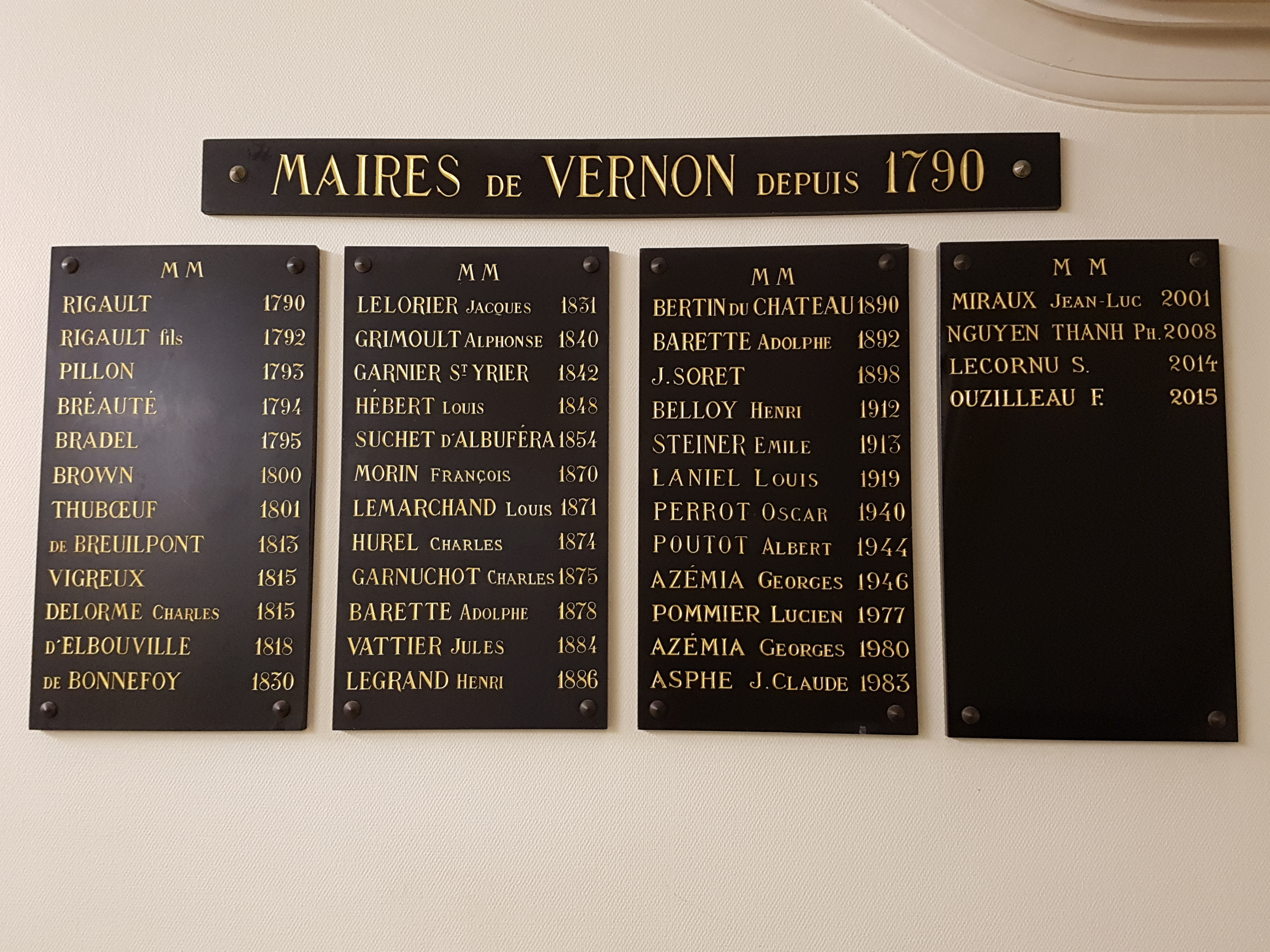 Mairie de Vernon